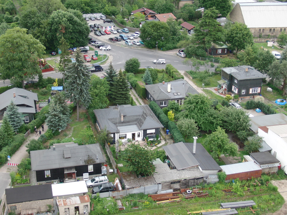 Kupferhaus in der Messingwerksiedlung, Eberswalde-Finow von Paul Mebes und Walter Gropius